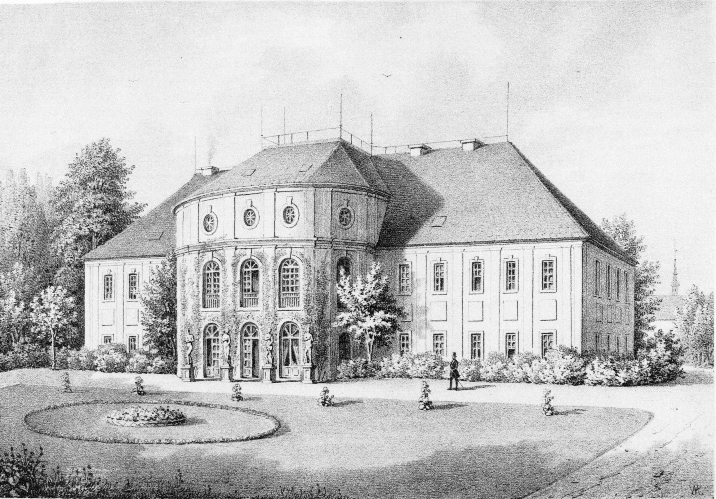 Das Schloss und Rittergut Königswartha Mitte des 19. Jahrhunderts